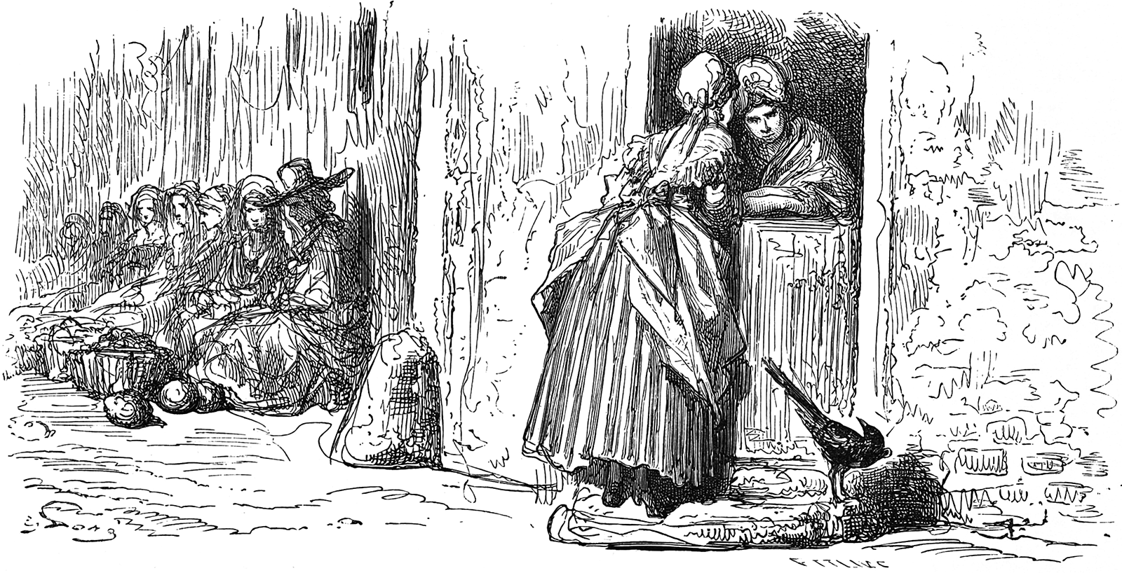 grafika z książki PL Bajki, Jean de La Fontaine, nakładem i drukiem Jana Noskowskiego, Warszawa 1876